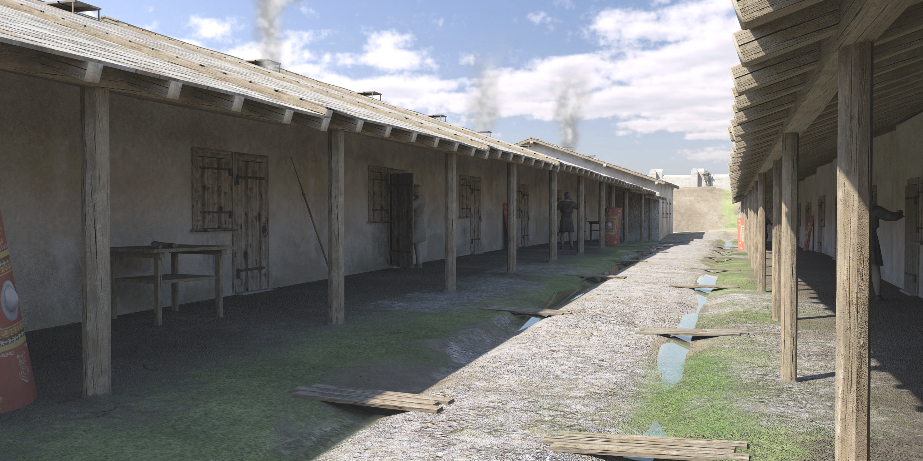 Virtuelle Idealrekonstruktion der Legionslagerbaracken im Bereich des Niedermünsters. Um 179 n. Chr.